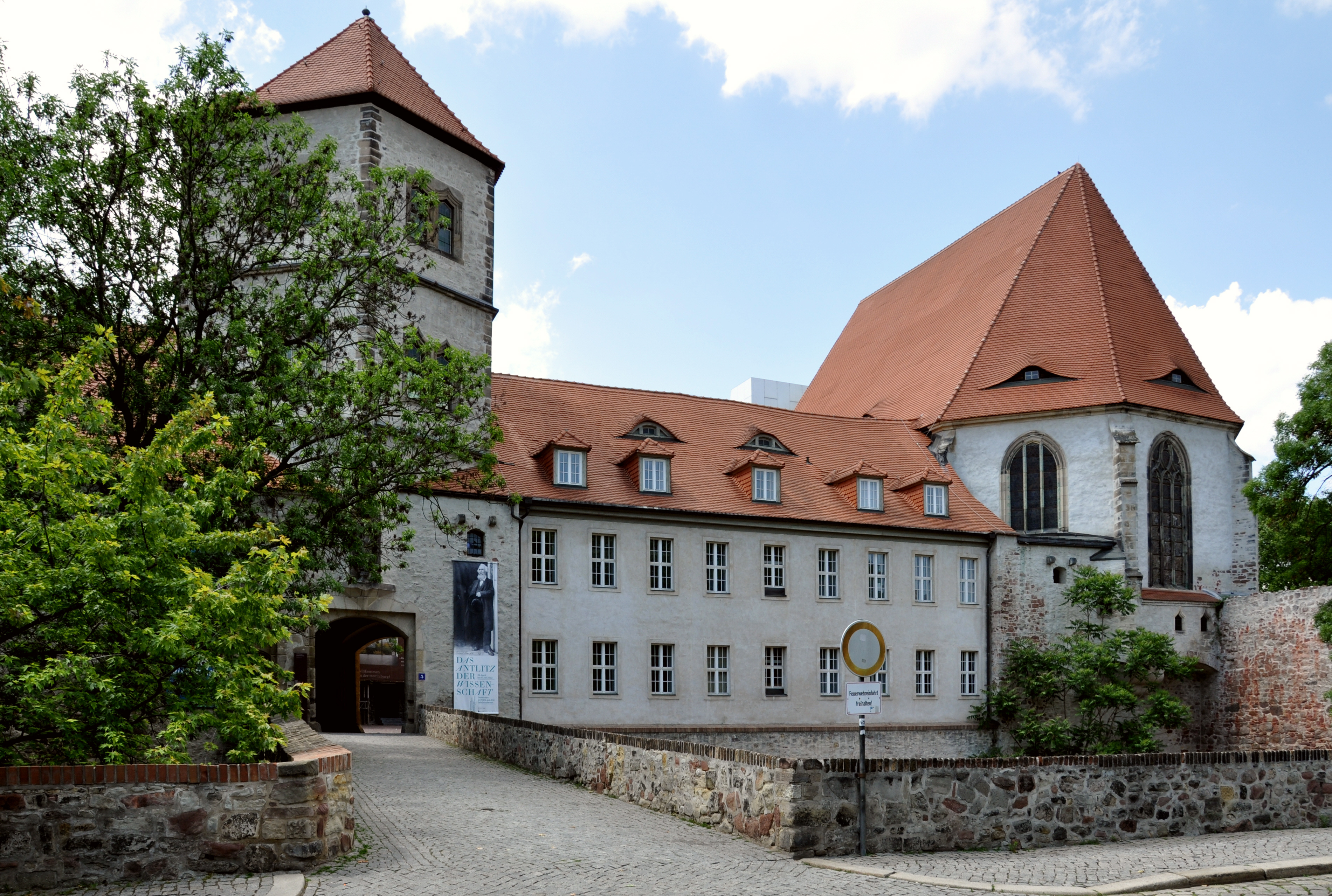 Halle (Saale), Moritzburg